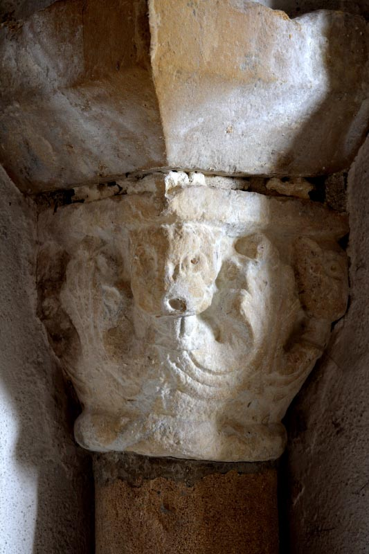 Chapiteau du choeur de l'église de Saint-Martin-du-Lac